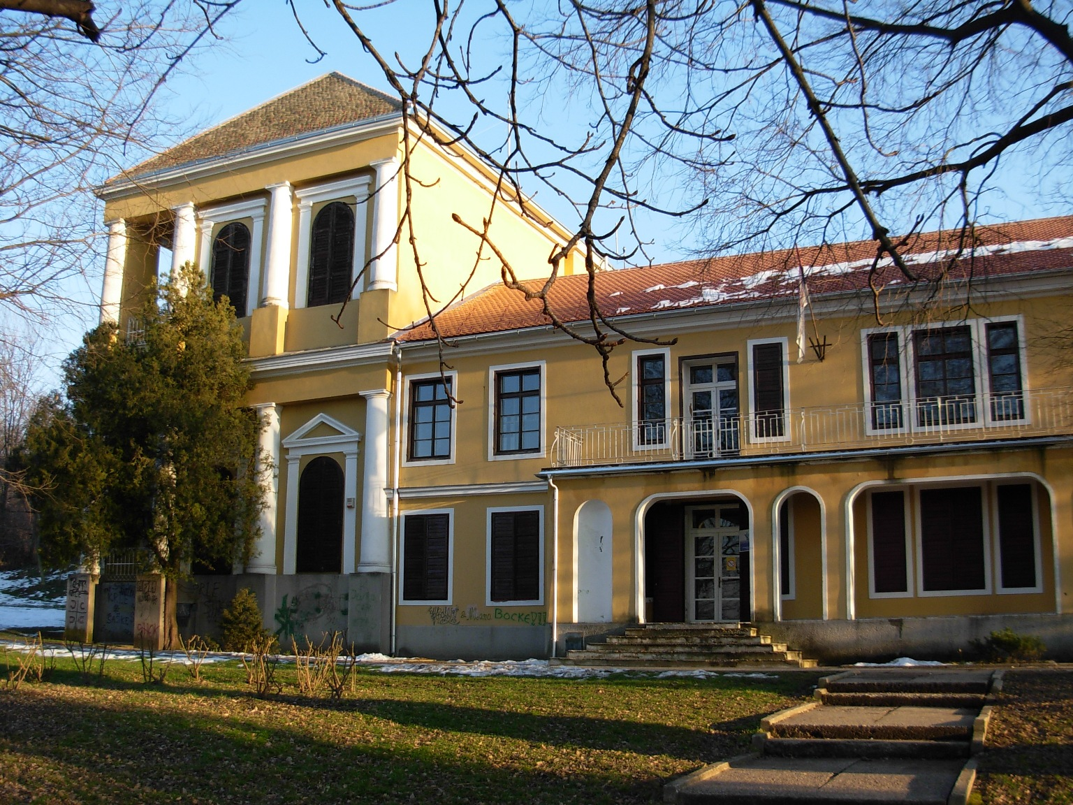 Dvorac Marcibanji-Karačonji u Sremskoj Kamenici.